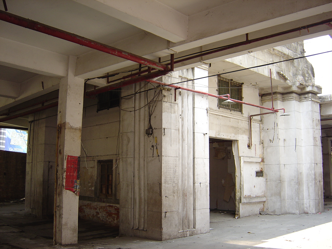 廣州市新一軍印緬陣亡將士公墓西門樓。版權說明：使用本相片必須署名「盧潔峰」，否則CC協議將失效，並追究相應的法律責任。